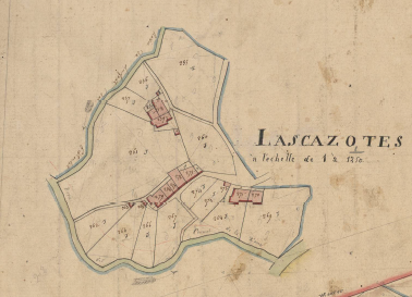 Les Casotes de Sant Llorenç de Cerdans en el Cadastre napoleònic del 1812 (Arxius Departamentals dels Pirineus Orientals)